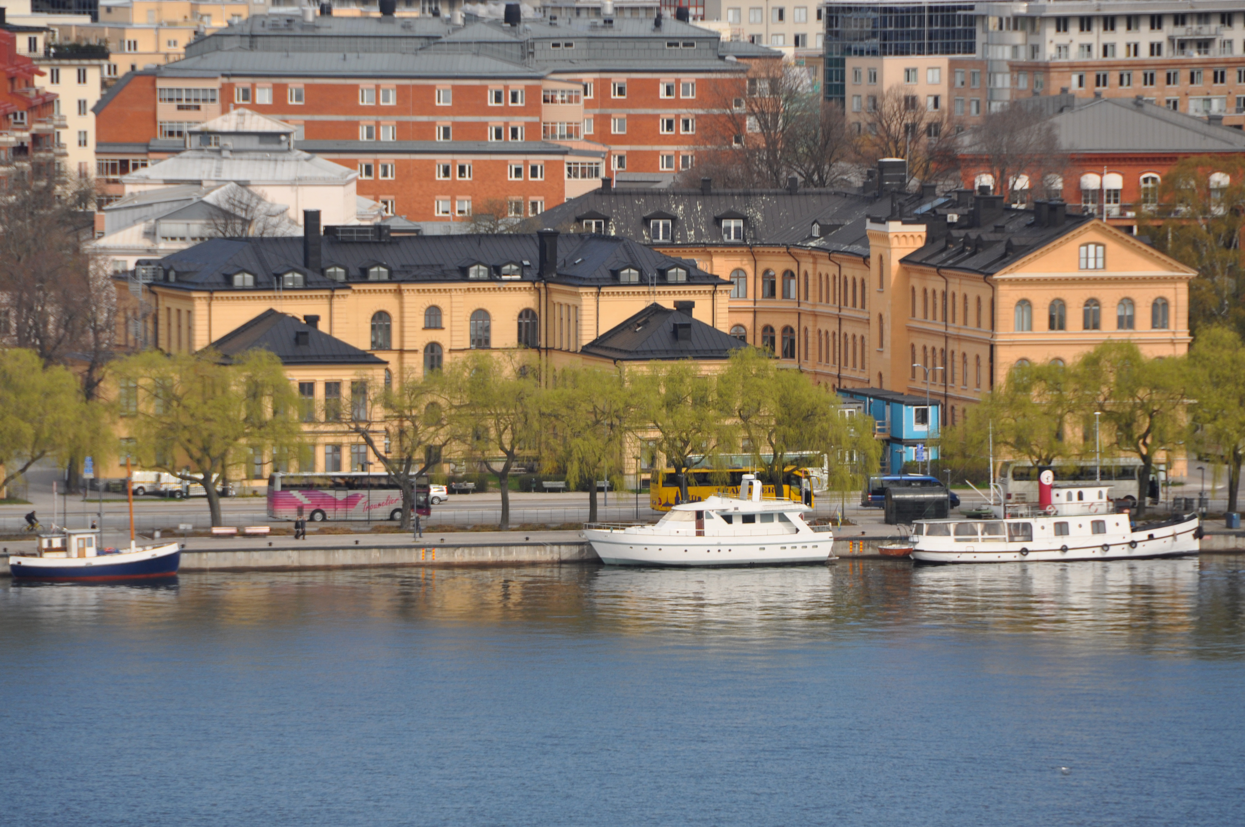 Gamla Karolinska Institutet på Kungsholmen. Byggnadsår 1866, arkitekt J E Söderlund, byggherre Medico-Kirurgiska Institutet, byggmästare H & H Hallström. 1894 förlängning av flyglarna i två våningar, påbyggnad med en vån på ursprungliga flyglarna samt envånig överbyggnad mellan flyglarna för kapell.